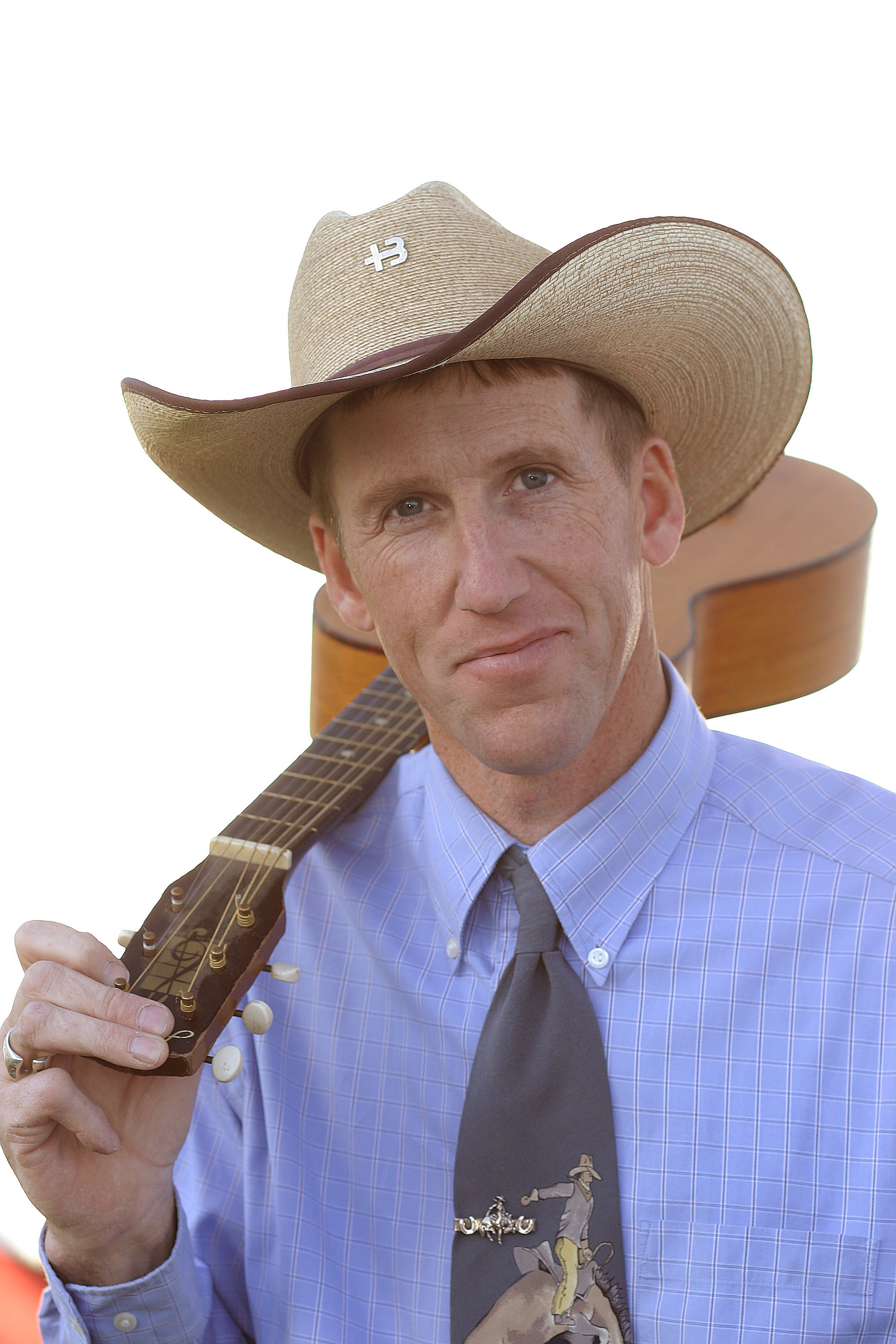 Wylie Gustafson